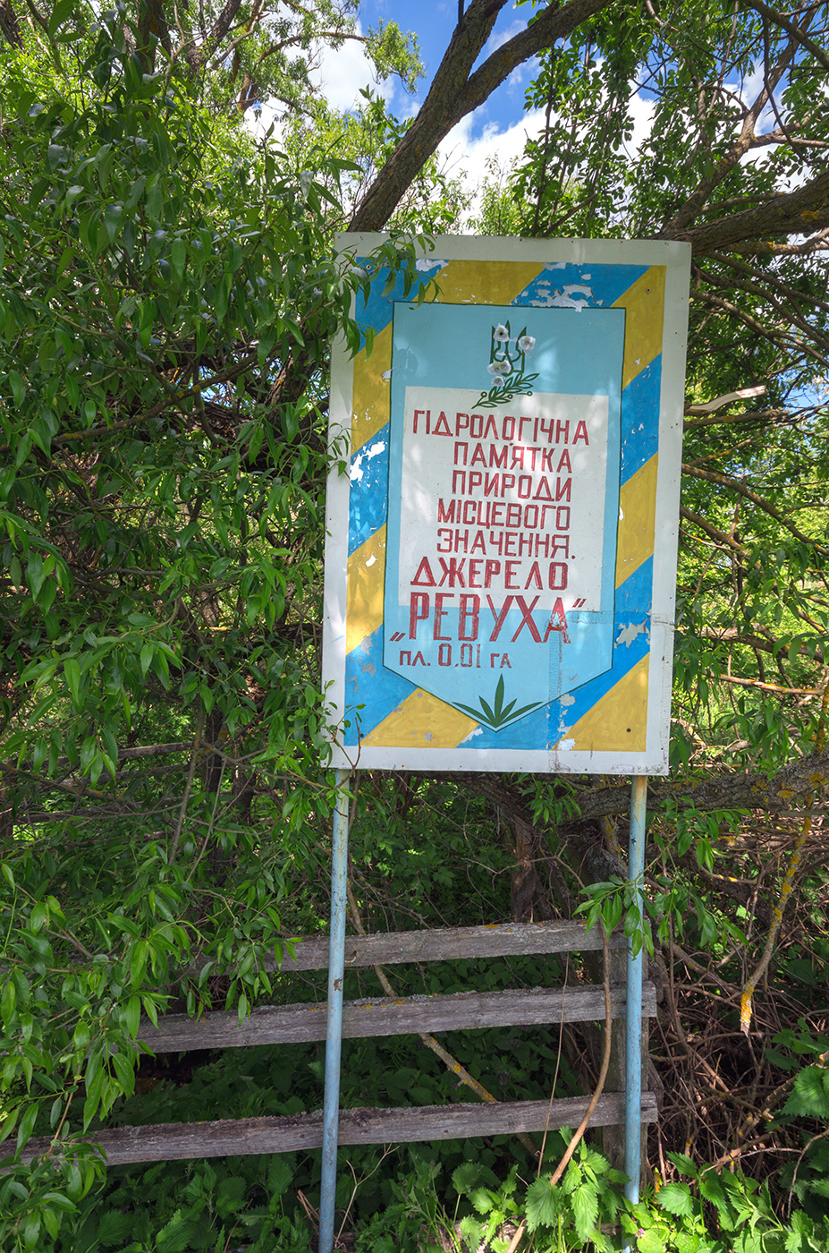 «Ревуха», Жмеринський район, Куриловецька с/р